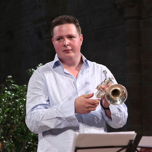 en répétition